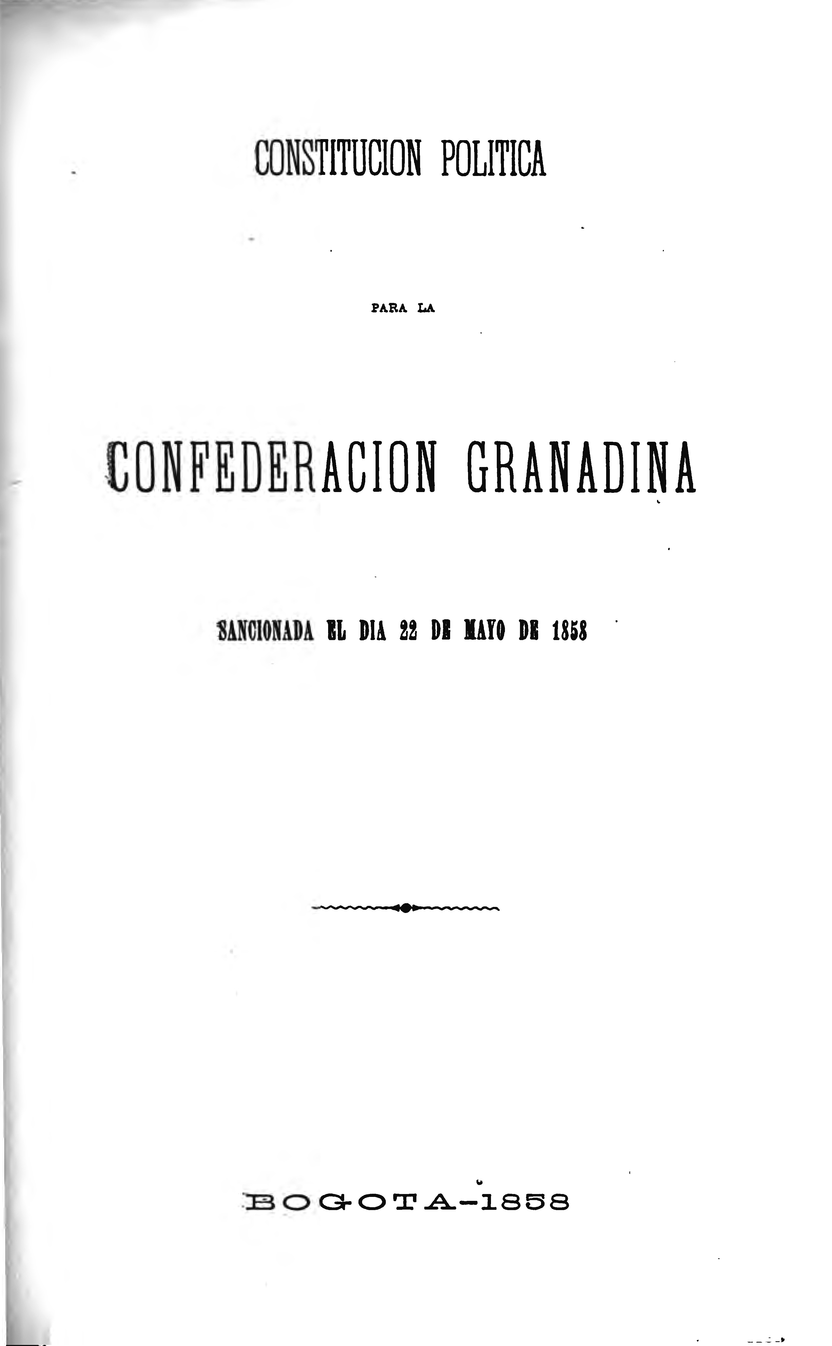 Constitución Política de la Confederación Granadina de 1858